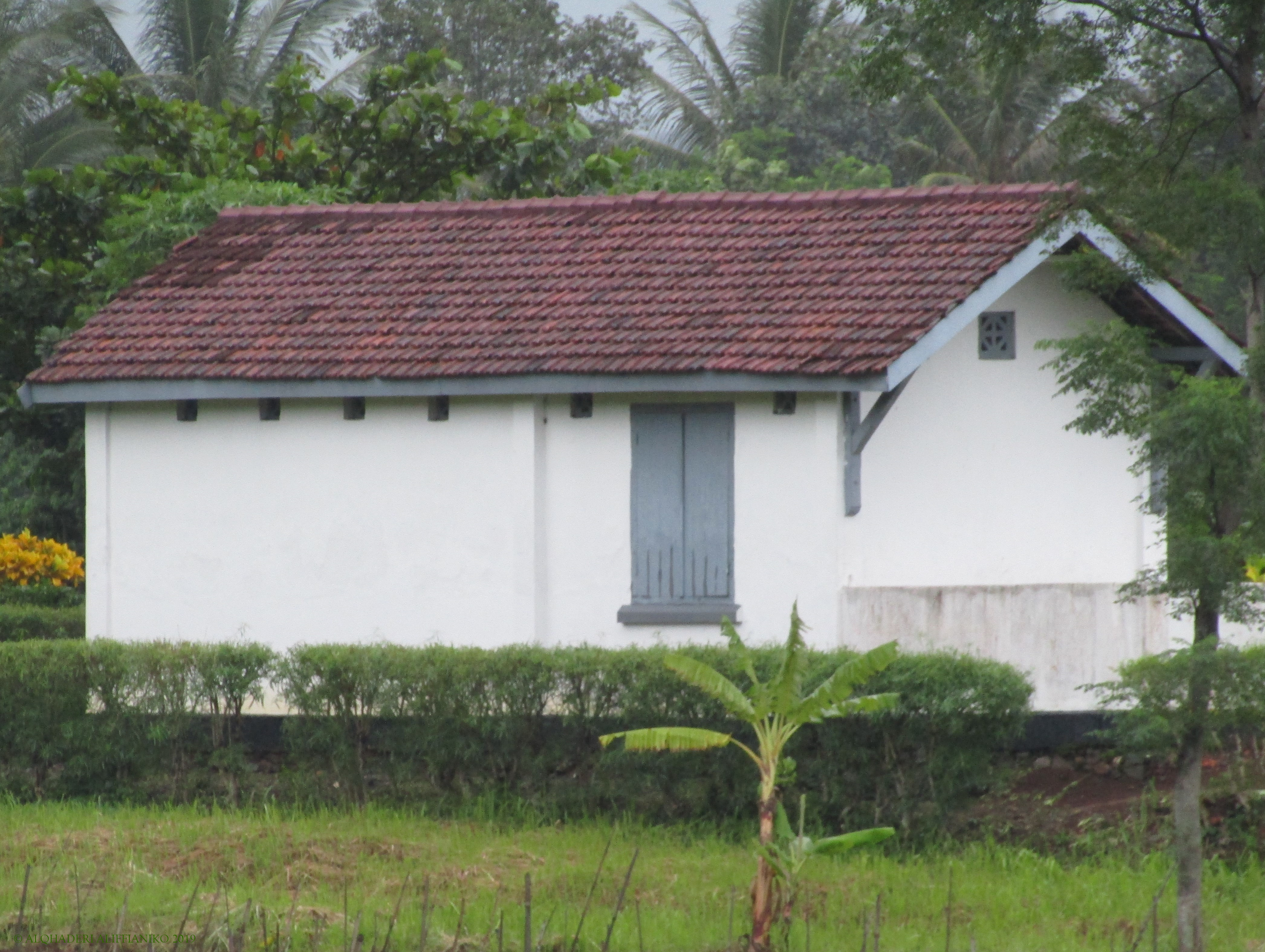 Tampak depan Stasiun Jambu, 2019